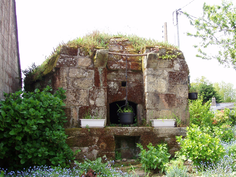 Four Kercloirec